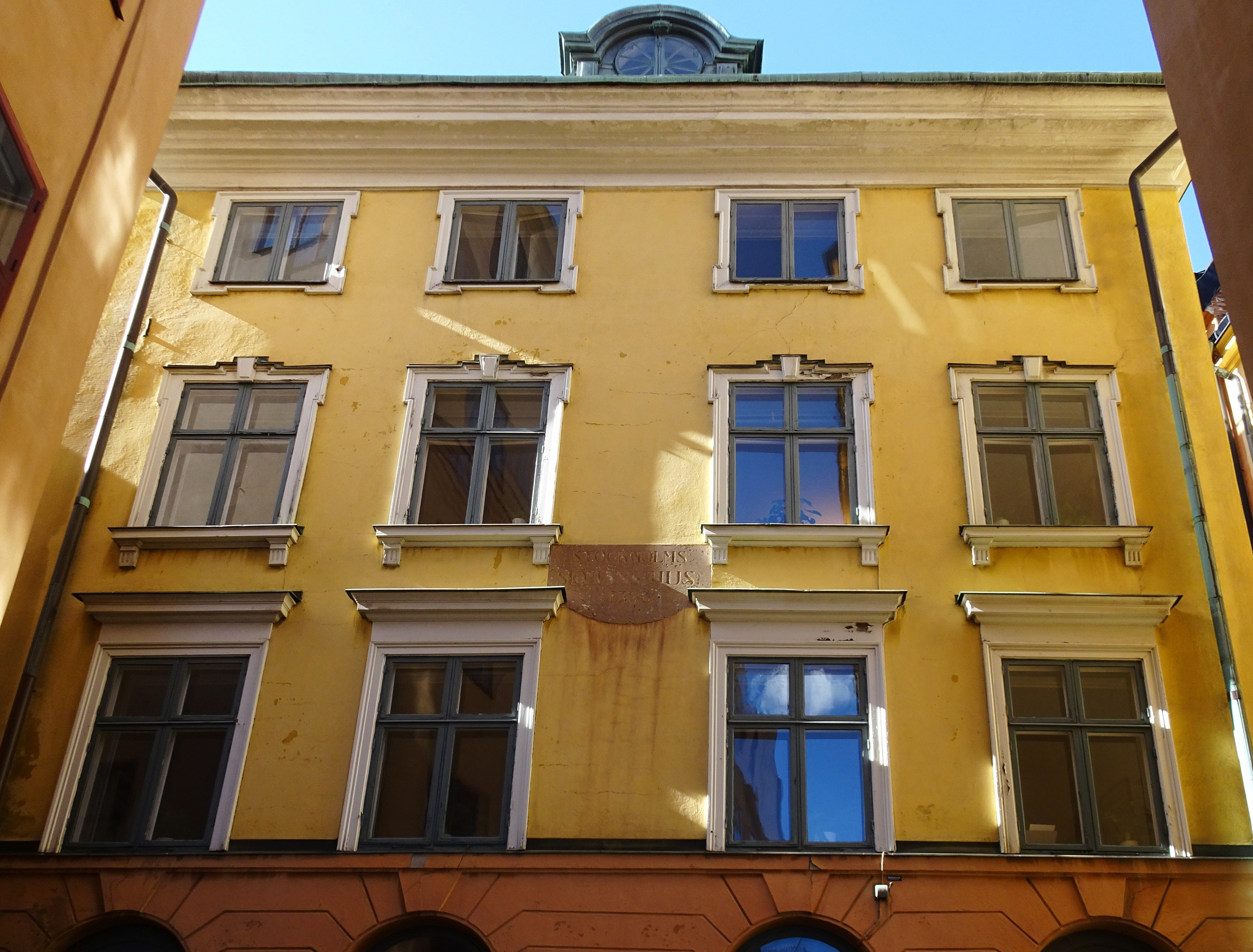 Stockholms sjömanshus, Gaffelgränd 1A